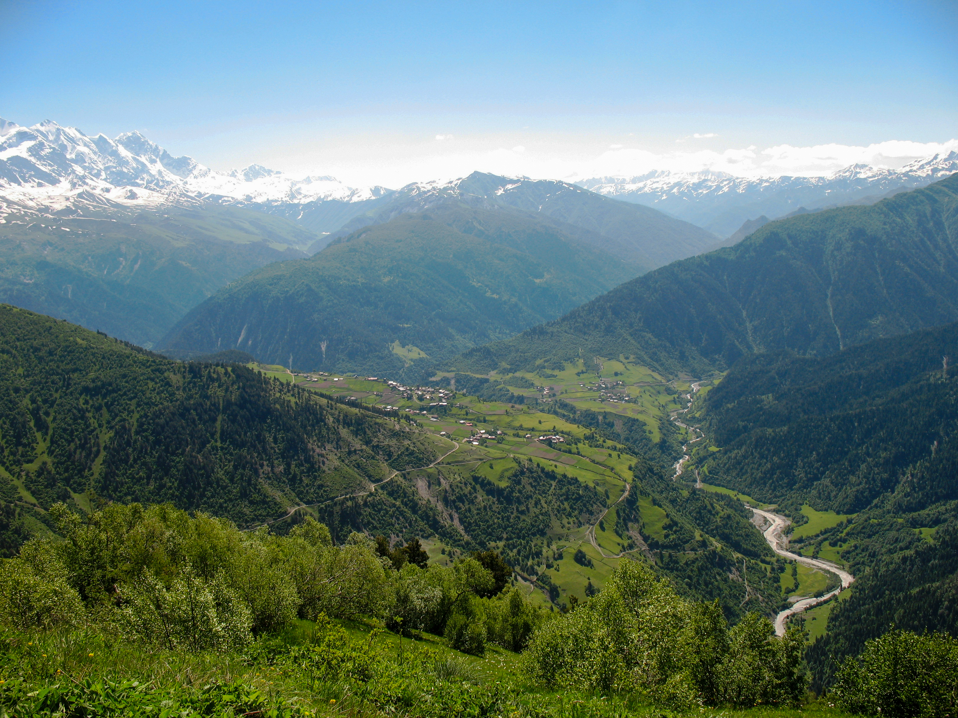 ენგურის ხეობა.